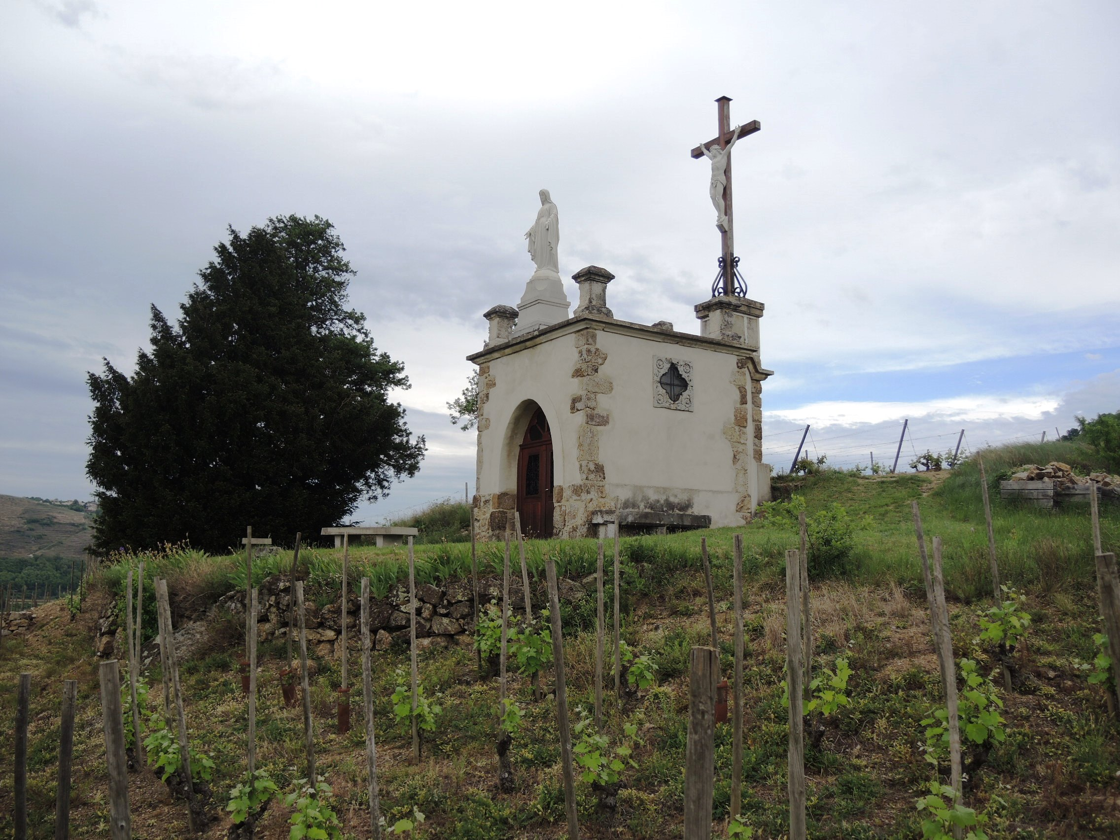 Saint-Etienne-de-Valoux détail